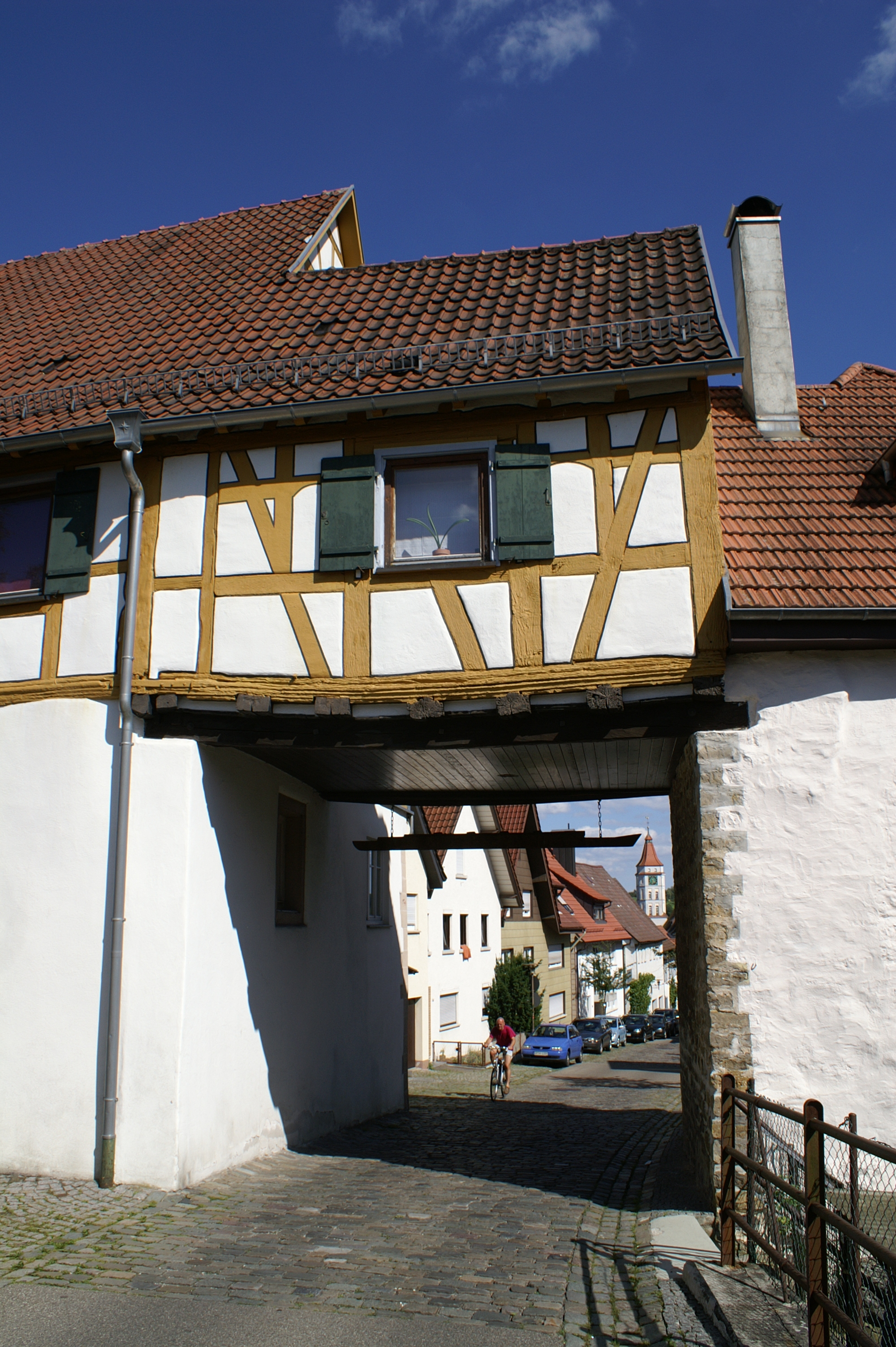 Das Obere Tor in Rechberghausen ist das einzige erhaltene historische Stadttor im Landkreis Göppingen